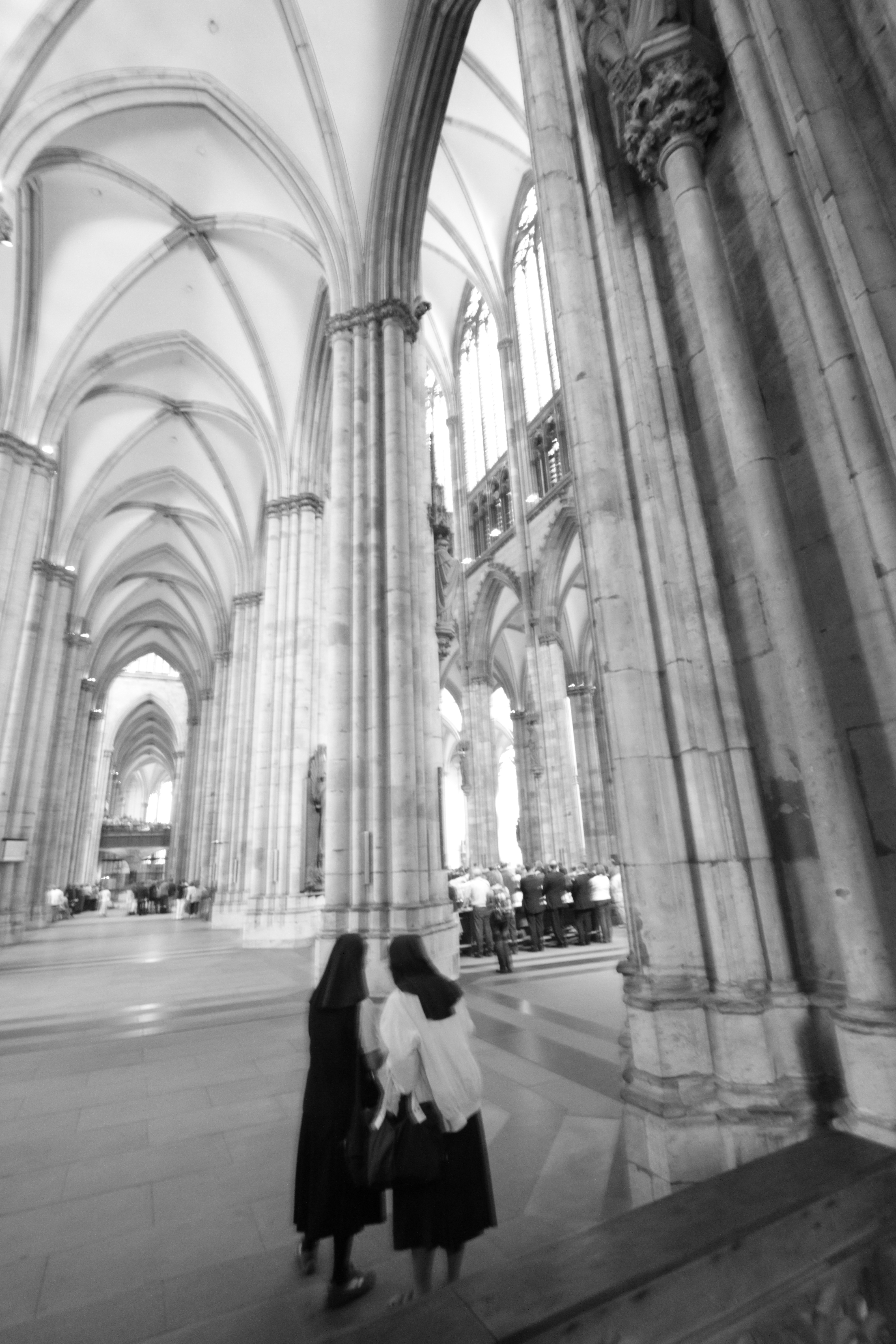 Ordensschwestern in Kölner Dom, 2010, Fotograf: Malek Homayonifar